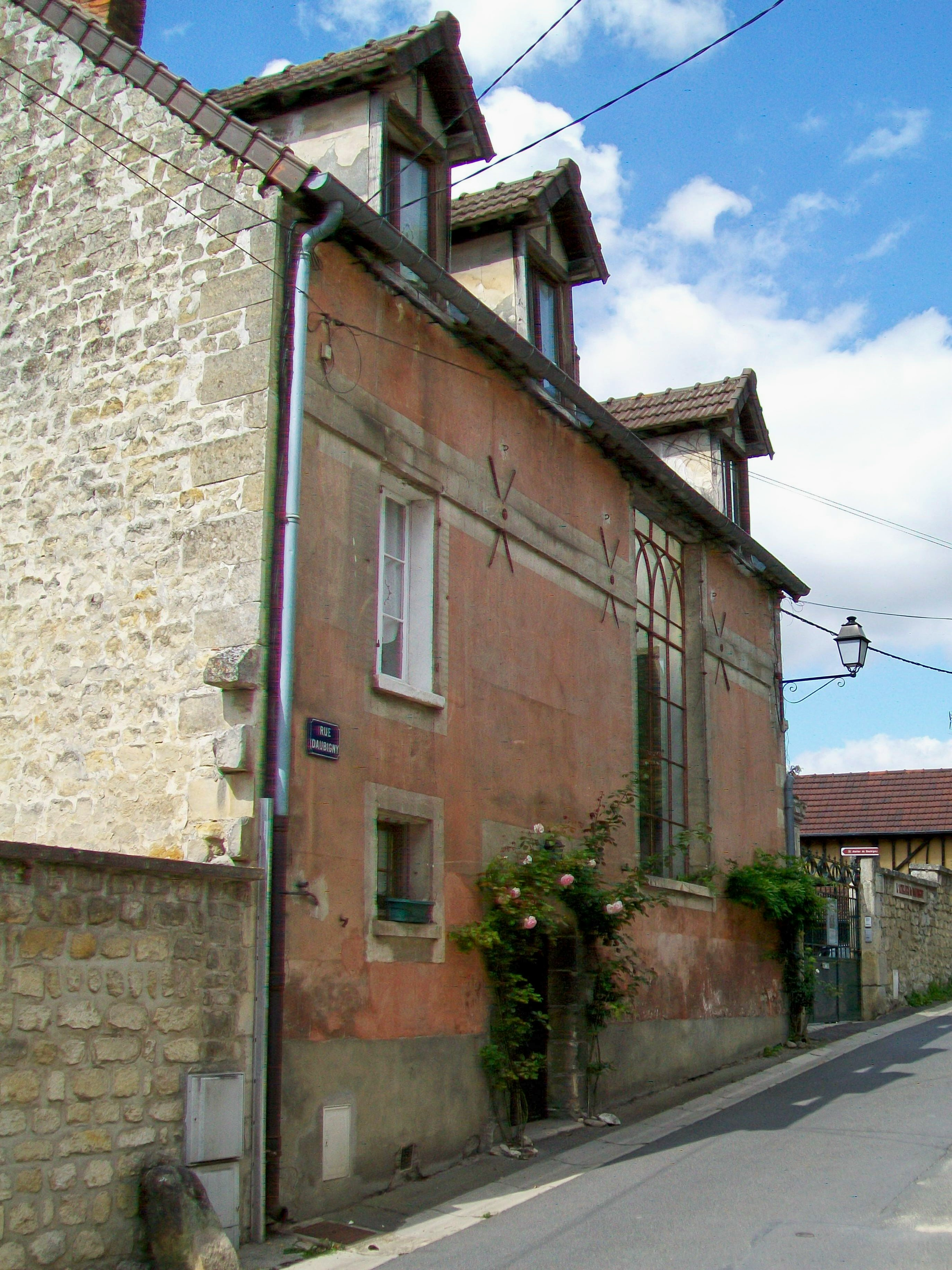 L'atelier de Karl Daubigny, fils de Charles-François Daubigny. L'atelier, au 59 rue Daubigny, avait été aménagé dans une ancienne grange à côté de l'atelier de Daubigny père.